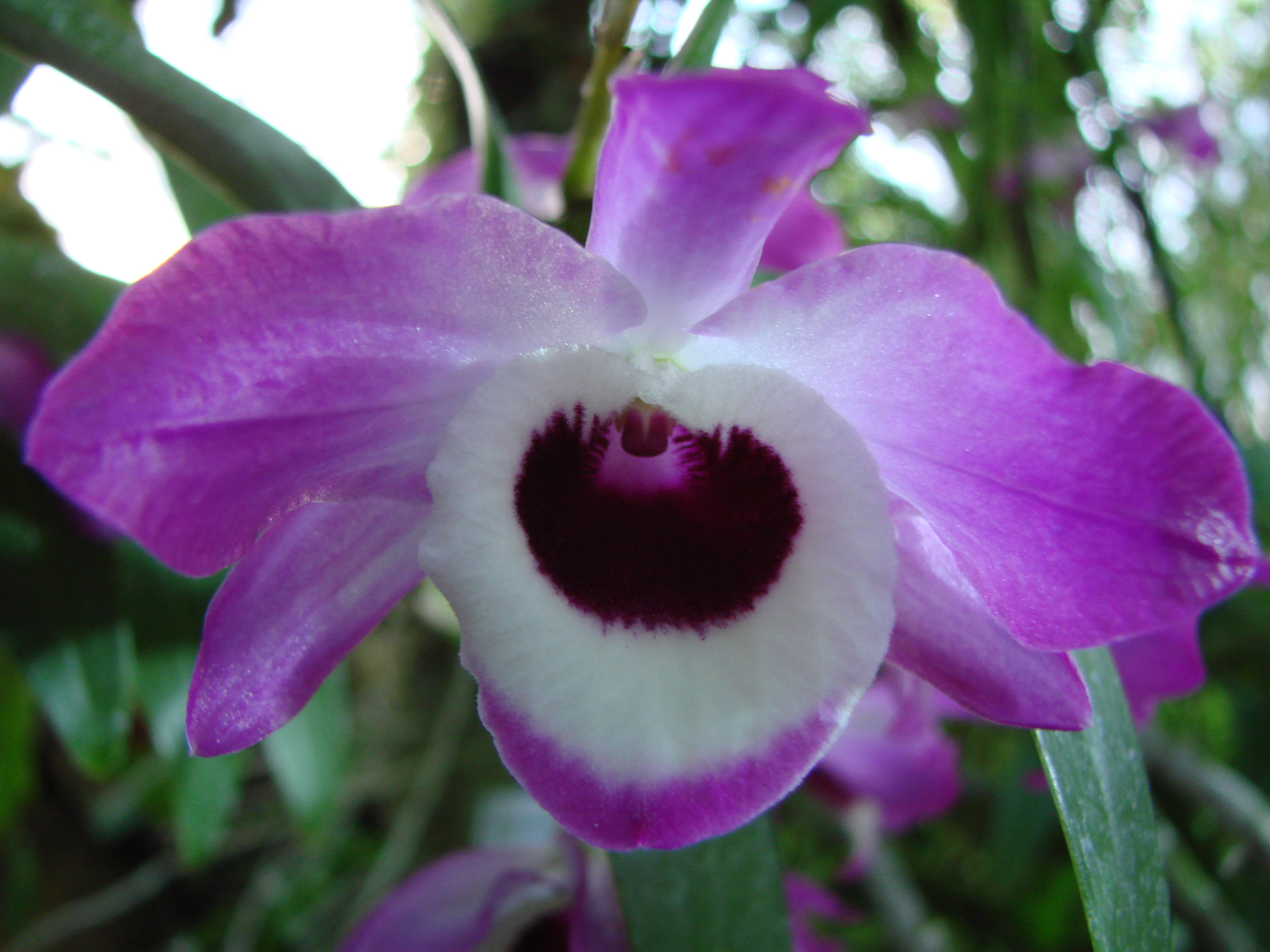 Jardin botanique de l'Université de Zurich (Suisse) : Dendrobium nobile Lindl. (1830)